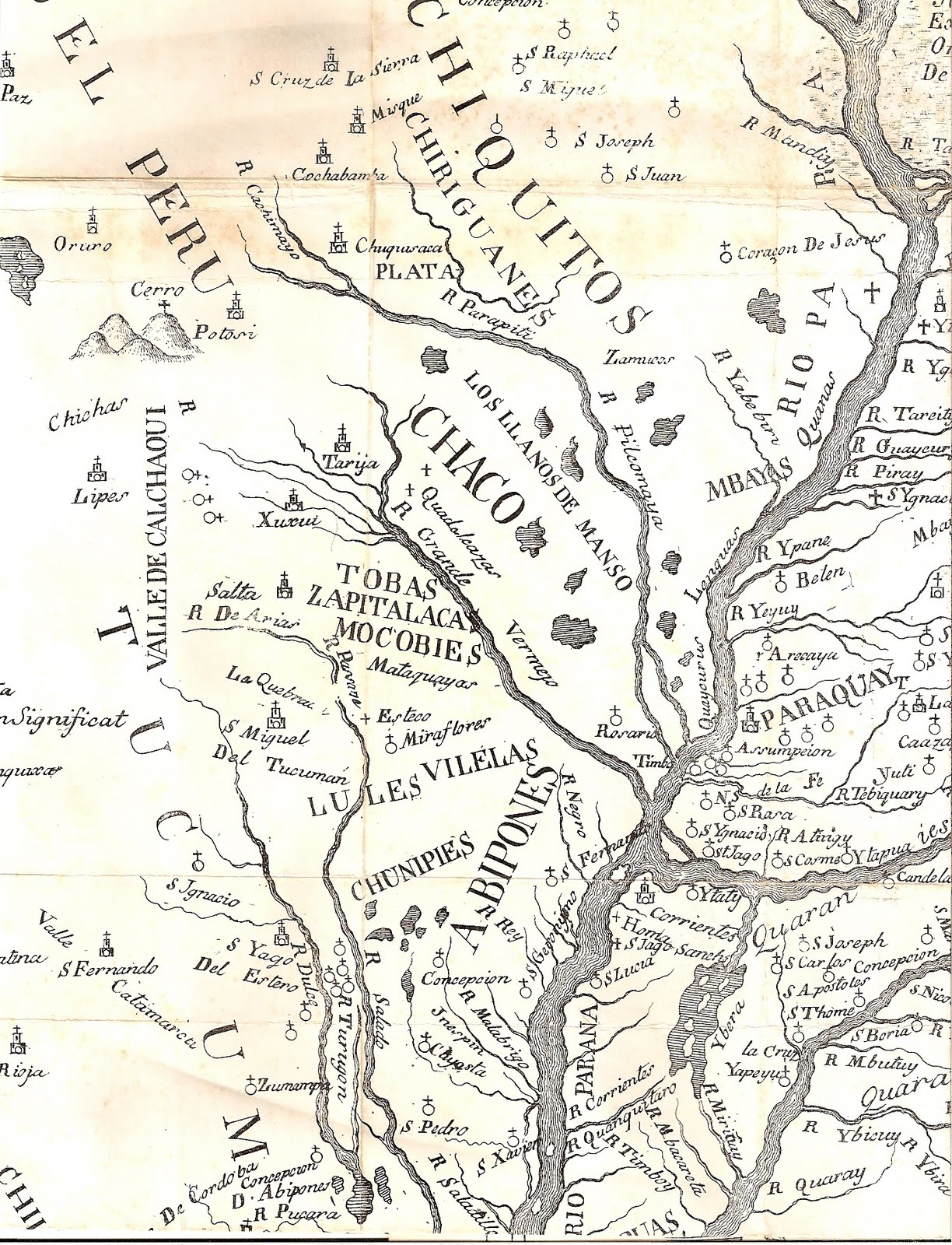 Mapa cartografiado de los indios abipones